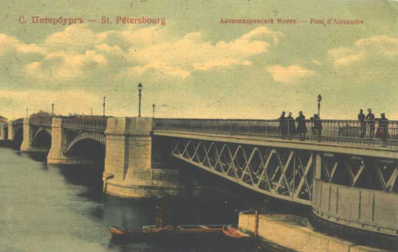 Поворотный разводной пролет Литейного моста через р. Неву в Санкт-Петербурге